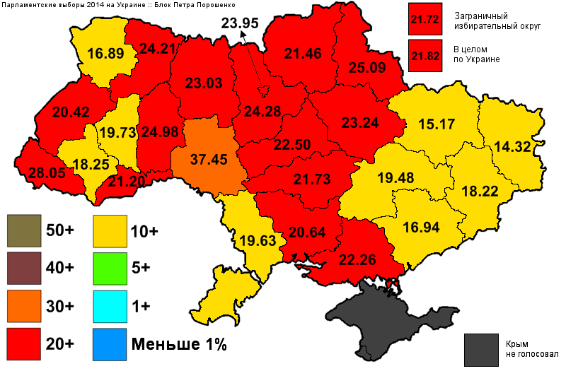 Результаты выборов в Верховную Раду Украины, которые состоялись 25 октября 2014 года. Информация с официального сайта ЦИК. Проценты по регионам для "Блока Петра Порошенко".